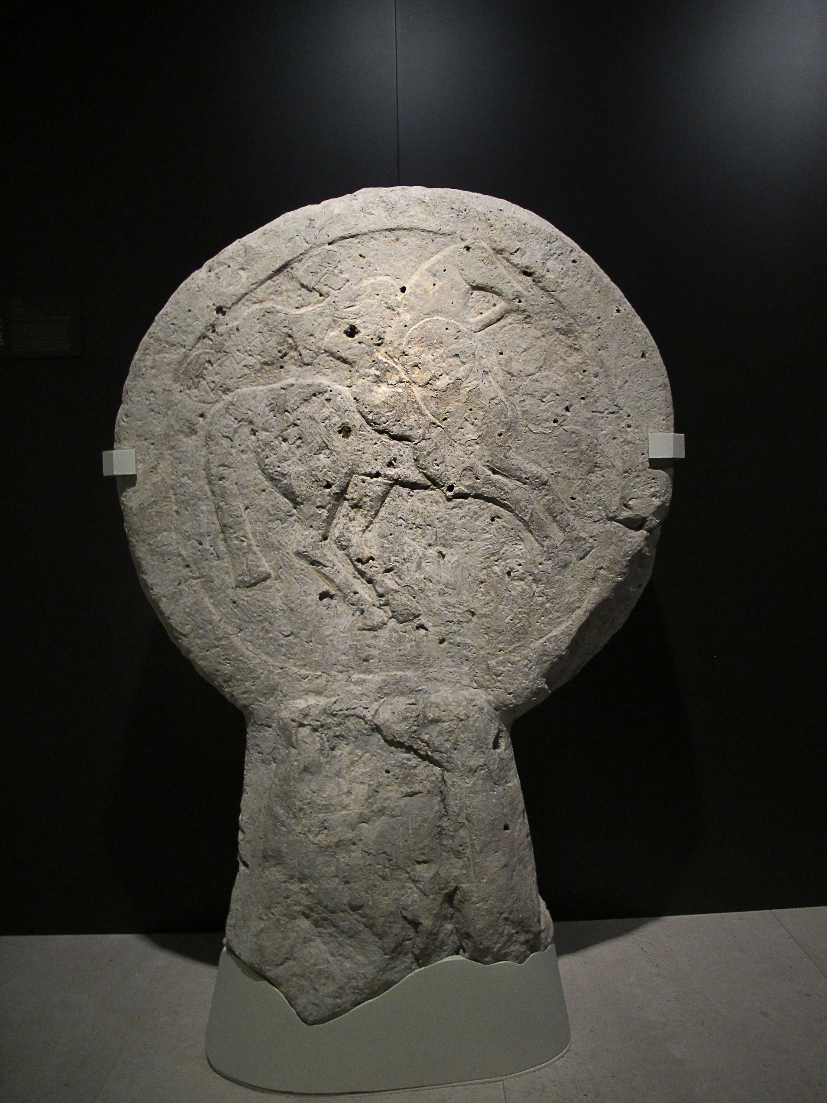 =========== Cabeza discoidal y pie troncocónico. En el disco se representa un jinete lancero a la derecha, con varios escudos discoidales a su alrededor. Estela funeraria de cabeza discoidal, característica del Norte peninsular. Muestra en bajorrelieve un jinete con escudo redondo (caetra) y una lanza de la que cuelgan otros escudos. Delante y alrededor del caballo más escudos, símbolo de los enemigos vencidos por el guerrero representado, identificado con el difunto. Es un ejemplo de simbiosis de costumbres celtíberas y romanas. Museo Arqueológico Nacional - Madrid